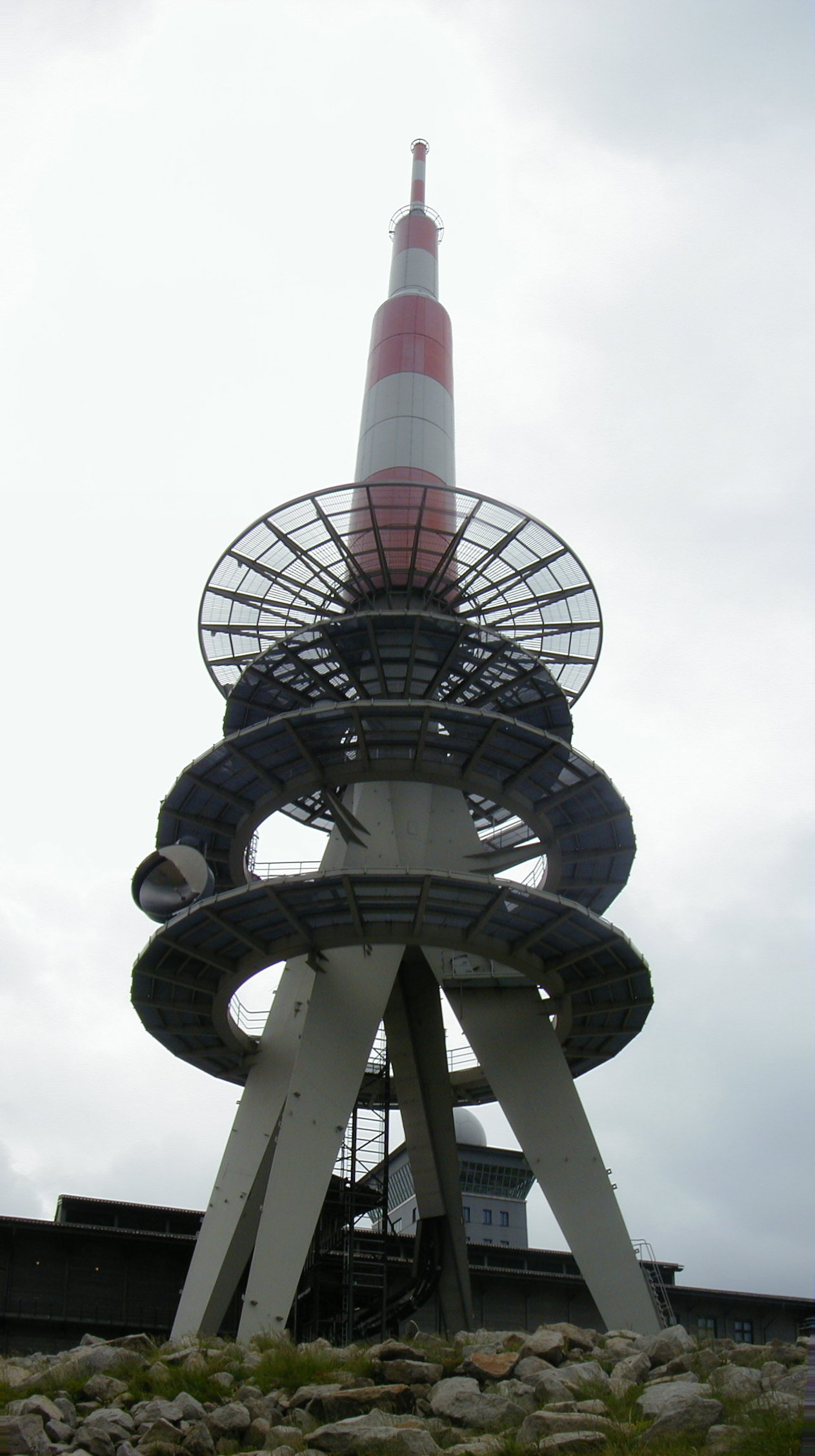 Telekomsendemast Brocken.